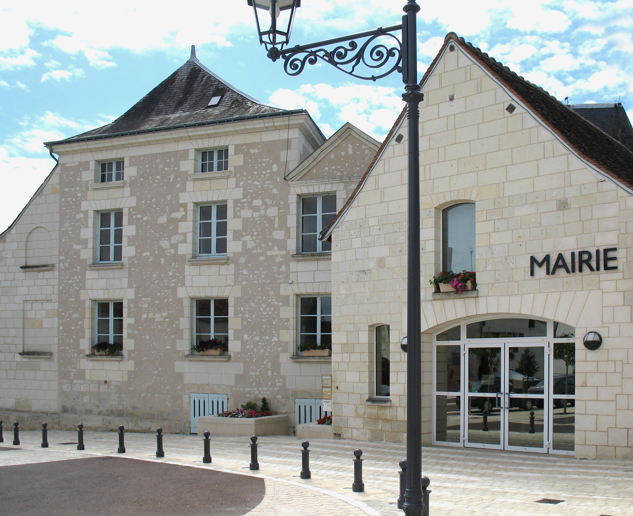 Mairie de Ligueil, Indre-et-Loire, France. La seigneurie qui sert de mairie depuis 1921, est un ensemble de bâtiments du XVIIe siècle. La place de la mairie a été rénovée en 2007.